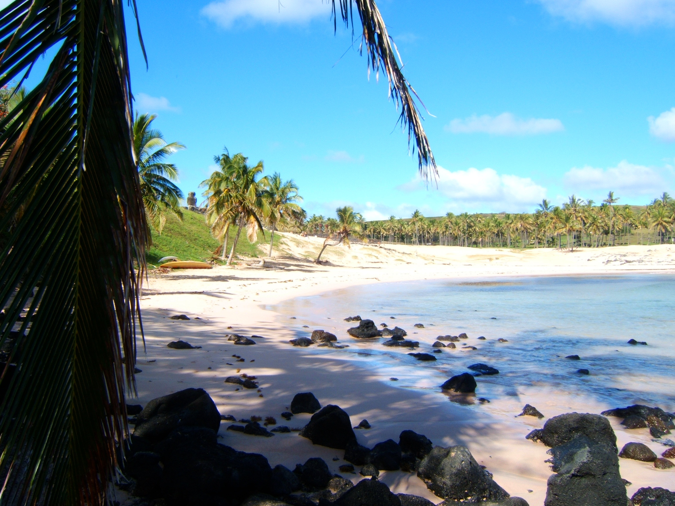 una de las dos playas de Rapa Nui This is a photo of a national monument in Chile: 628